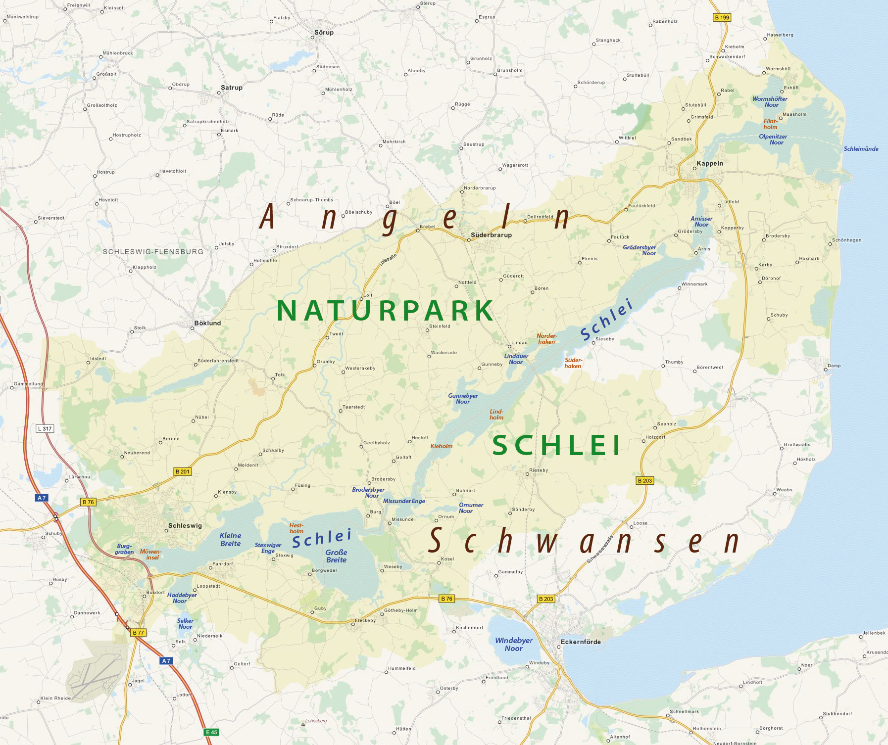 Karte des Naturparks Schlei